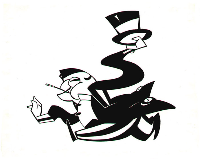 hombre en frac